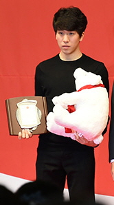 제19회 코카-콜라 체육대상 : 제1부